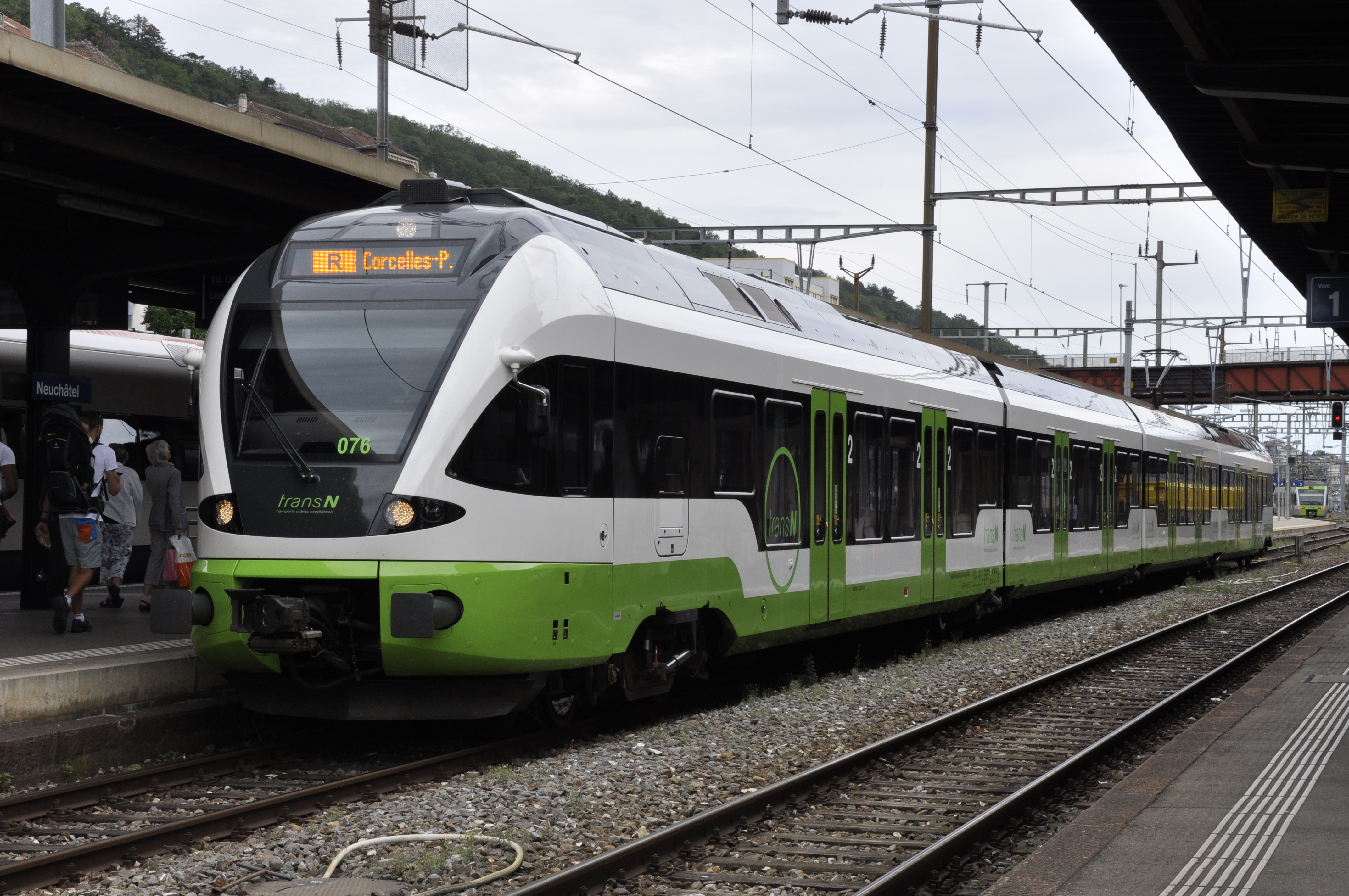 TransN RABe 523 076